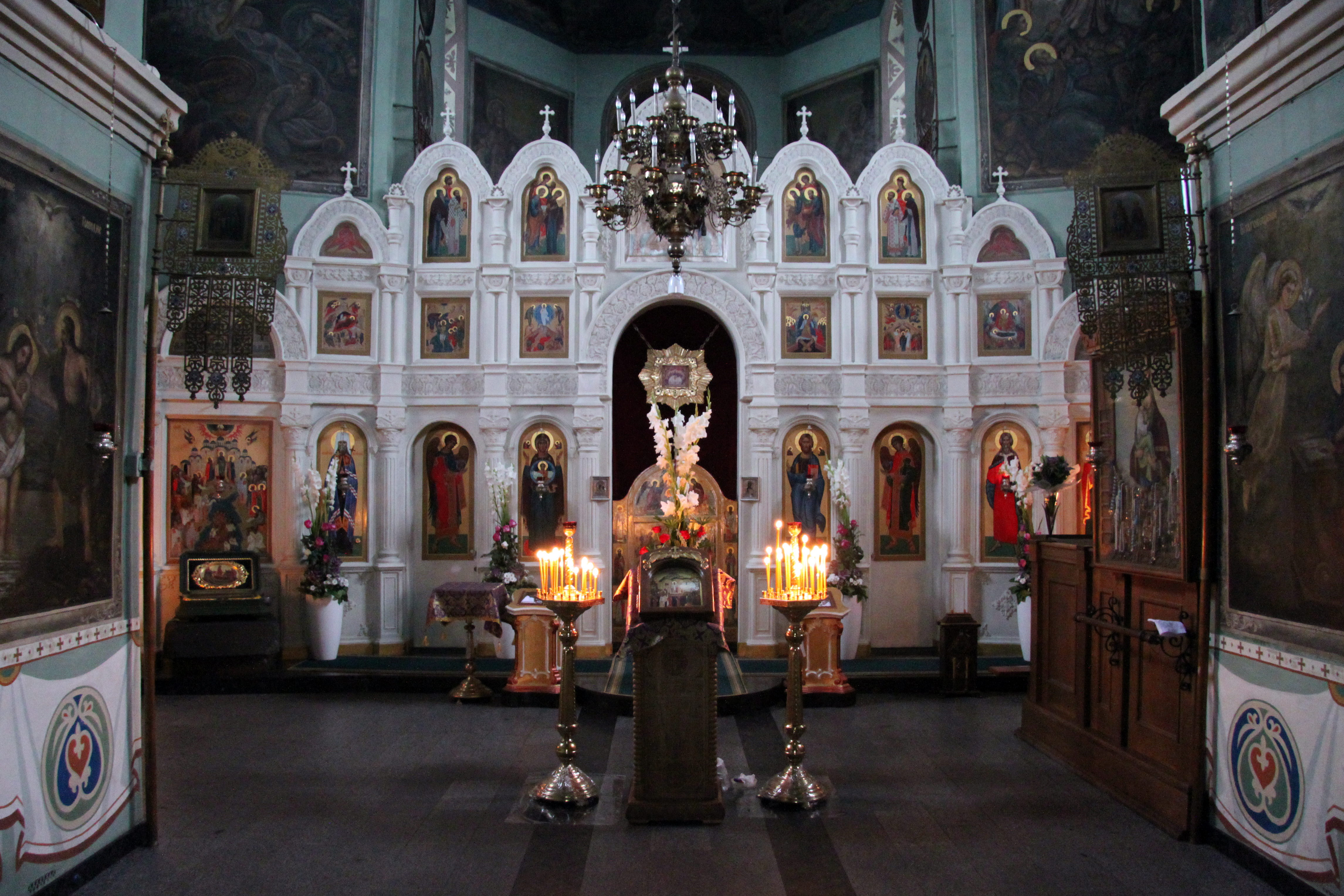 Церква Іллінська, Київ, Почайнинська вул., 2